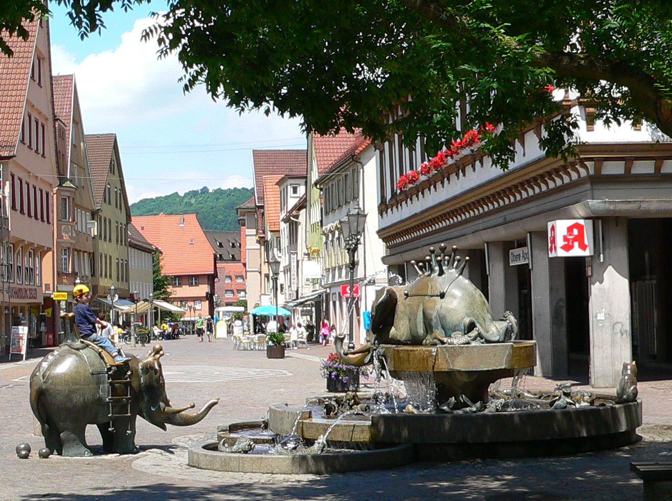 Forellenbrunnen neben dem Alten Rathaus, Geislingen an der Steige, Deutschland